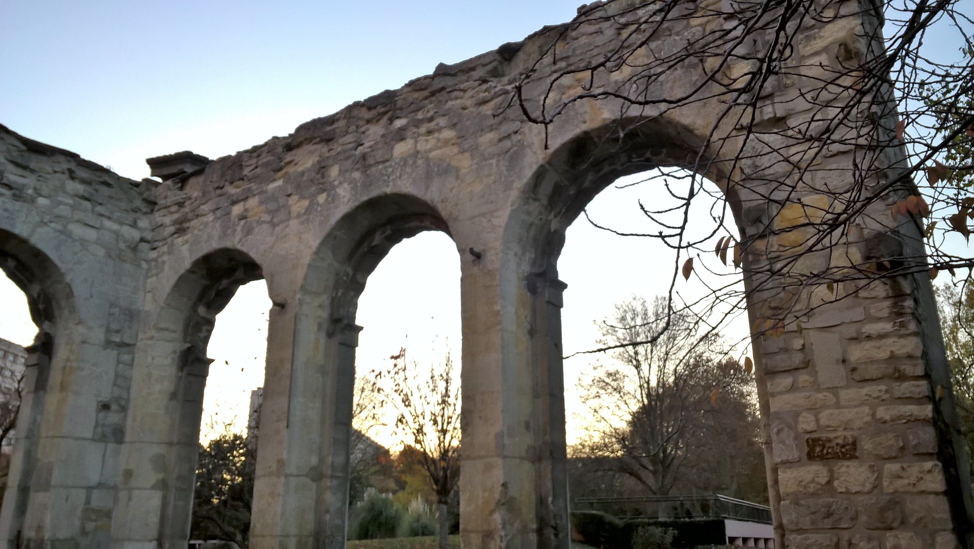 Vestiges de l'orangerie du Château de Charentonneau, à Maison Alfort